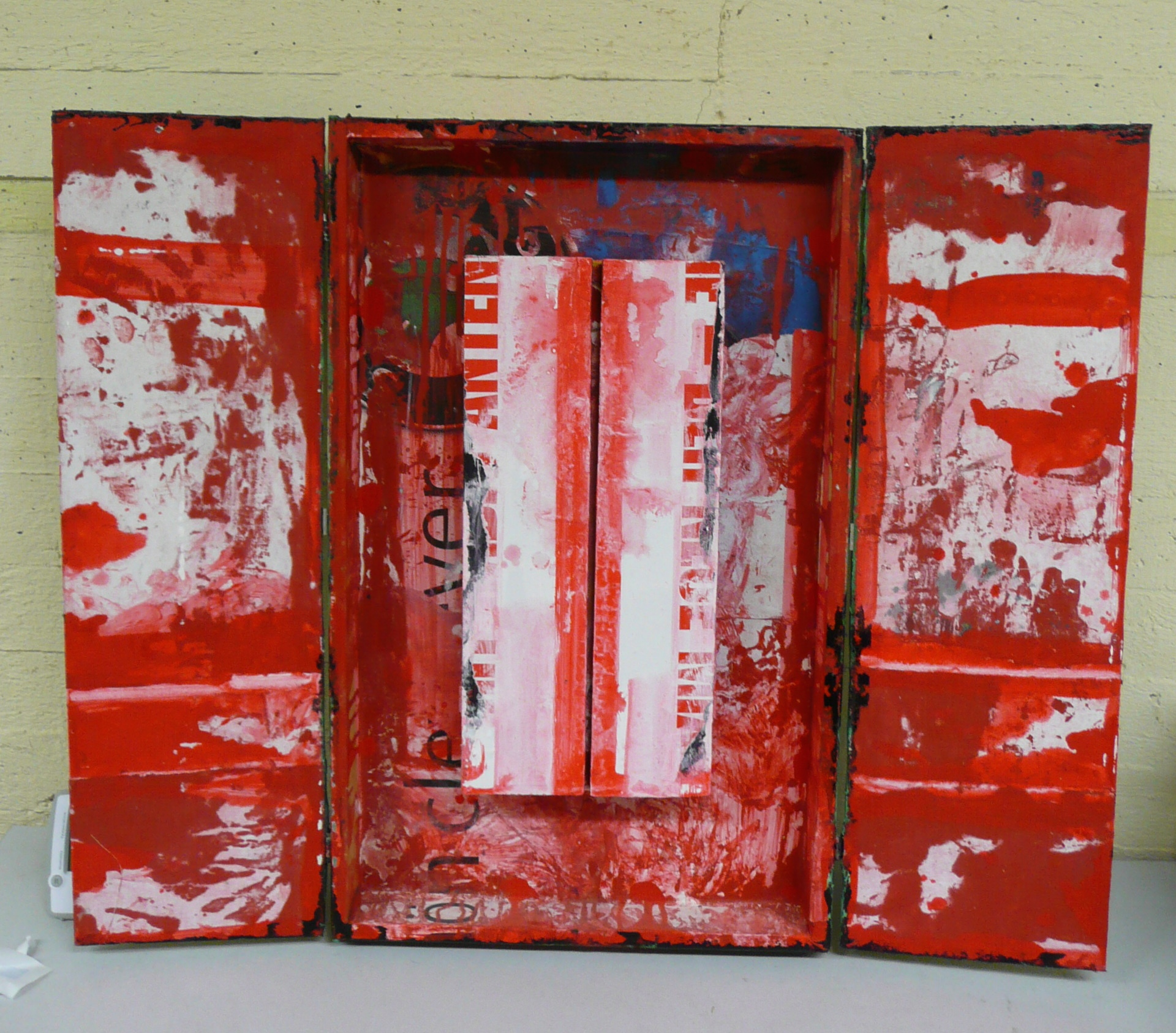 mehrflügeliges Kastenbild von B. Rokahr